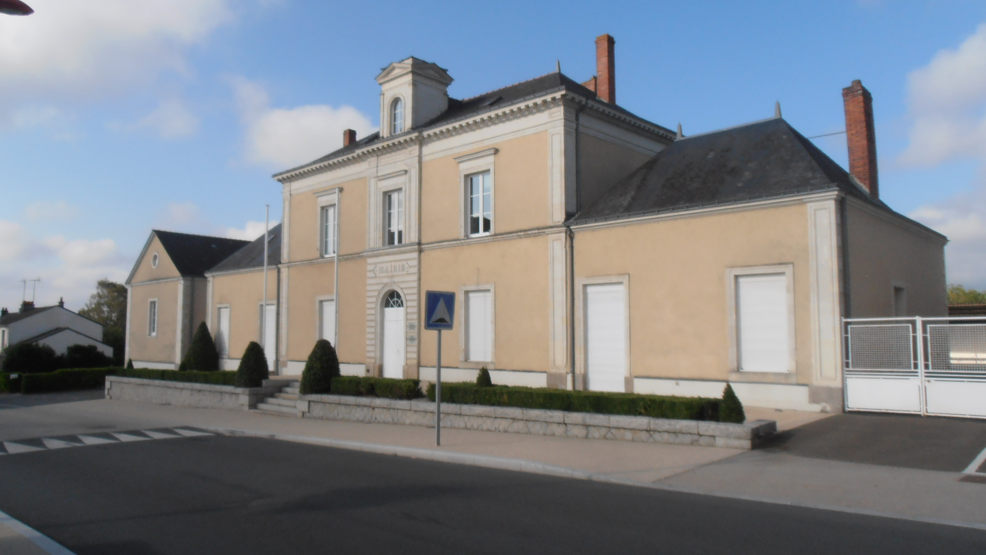 La mairie de Bécon-les-Granits (Maine-et-Loire, France).